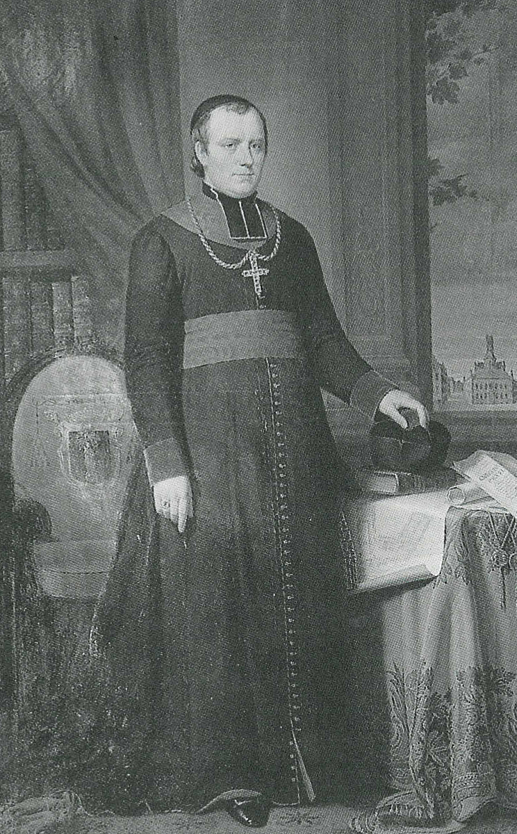 Louis Joseph Delebecque (1796-1864) - bisschop van Gent van 1838 tot 1864 - Gent - Oost-Vlaanderen - België